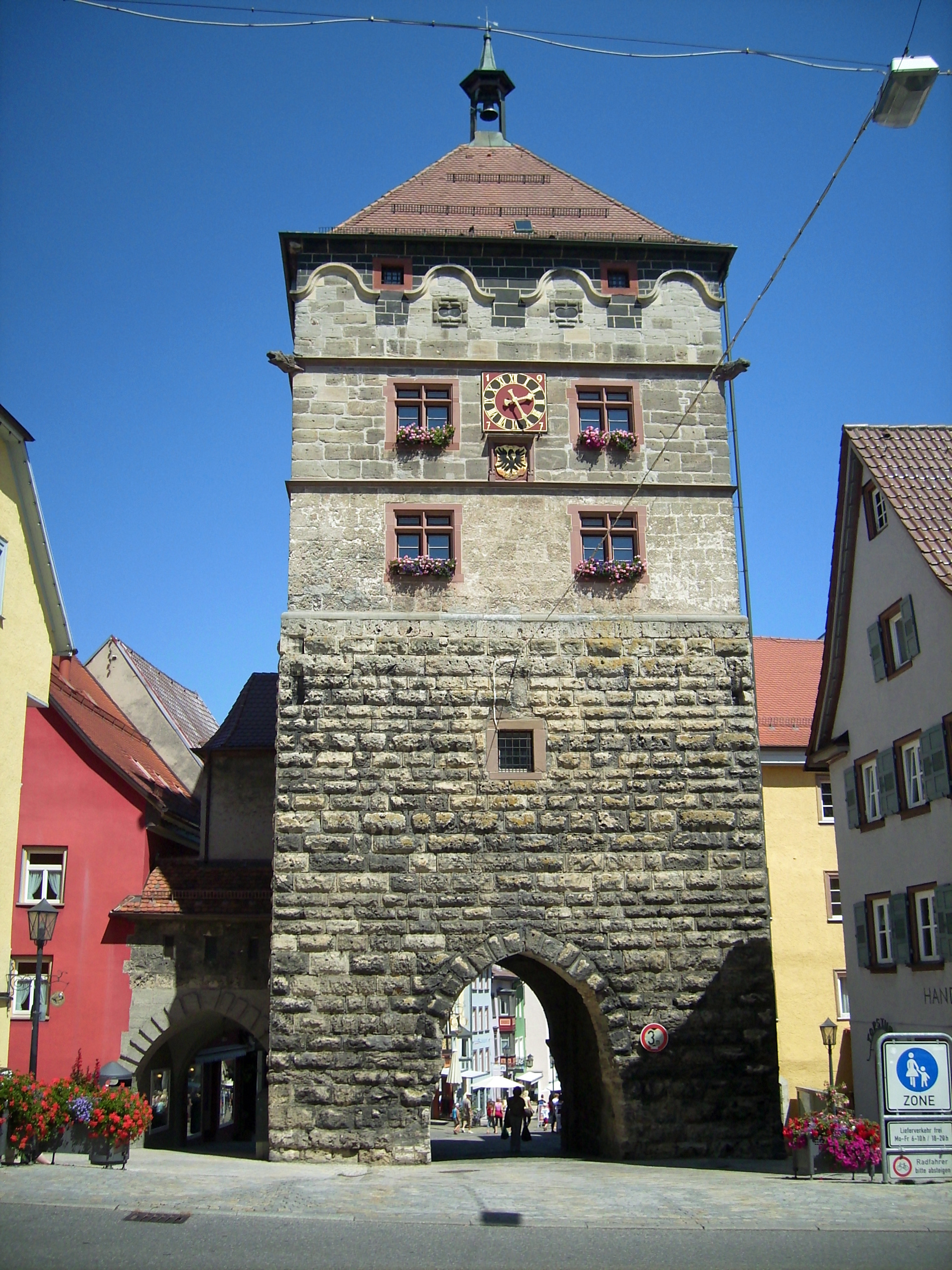 Rottweil: Schwarzes Tor